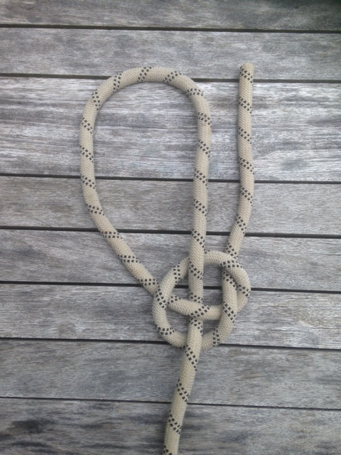 2eme phase du noeud